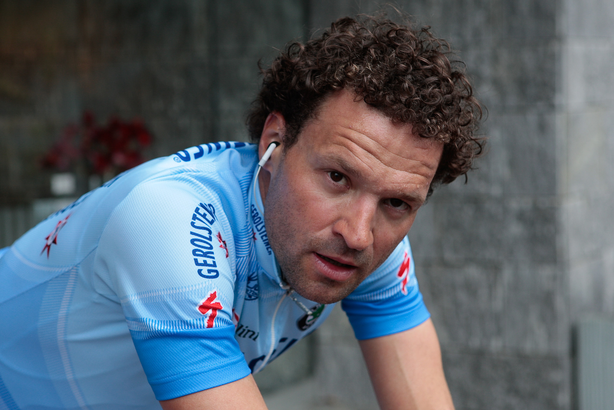 Peter Wrolich, Rund um den Henninger Turm 2008